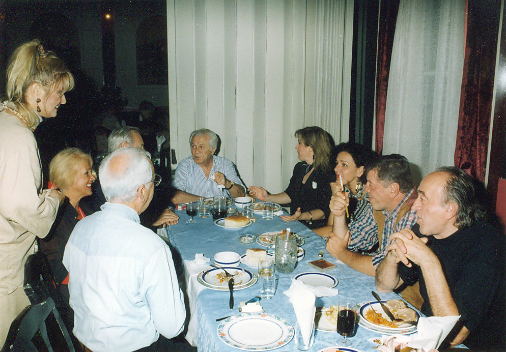 Dragomir Felba u čelu stola na Filmskim susretima u Nišu 1997. godine. Pored njega za stolom su i Ružica Sokić, Marko Nikolić, Danica Maksimović...